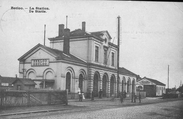 Het stationsgebouw te Eeklo (begin 20e eeuw)